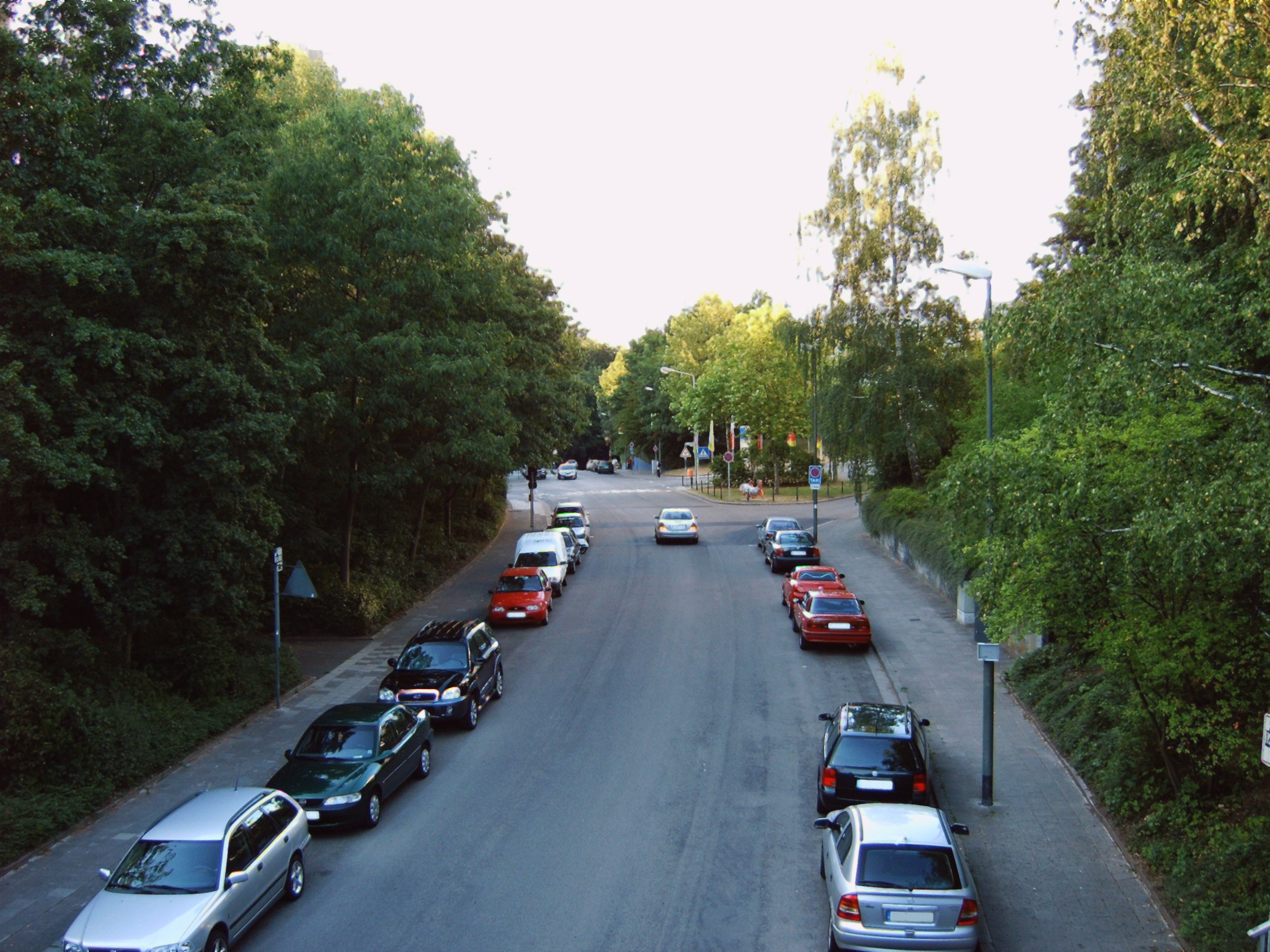 Kaiserslautern-Betzenberg, crossing Kantstraße and Hegelstraße